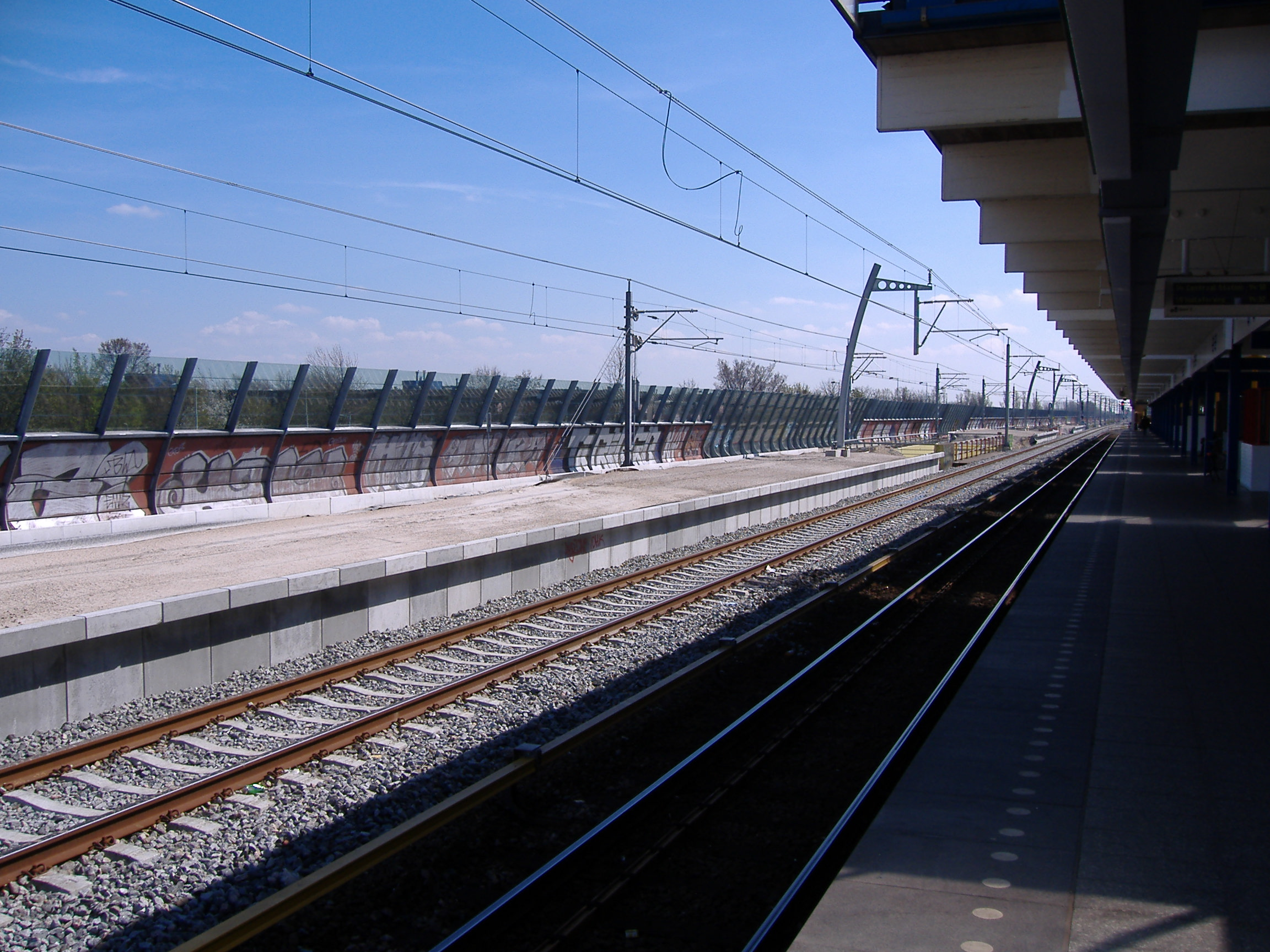 Eigen opname, 8 april 2007